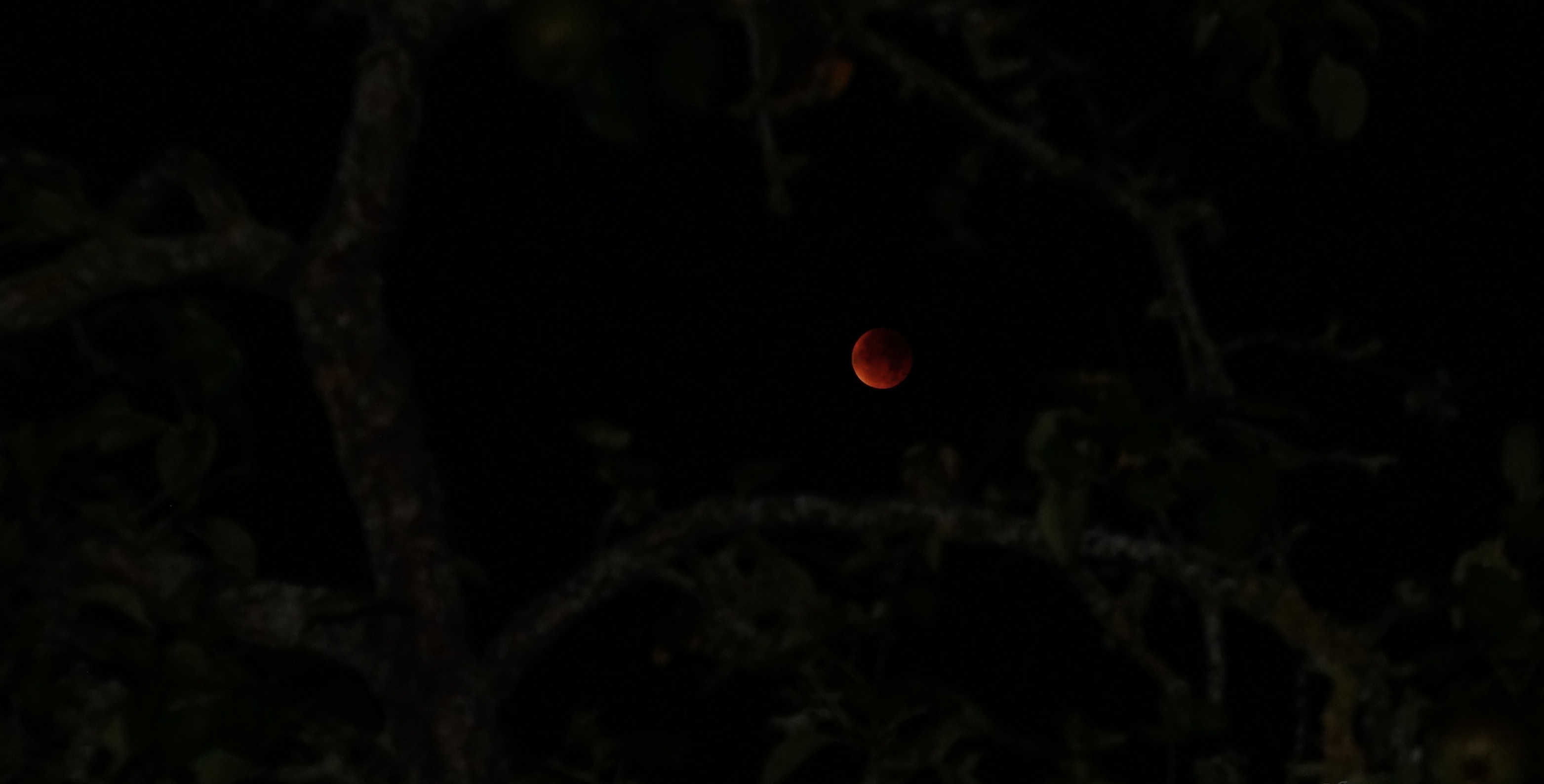 Image la dernière "Lune de Sang" de la Tétrade du début du XXIème siècle. La Lune donnait un spectacle immanquable dû à la conjonction de deux phénomènes : l' éclipse et la superlune.La photo a été prise lors du maximum de l'éclipse, à 4H47 heure française.